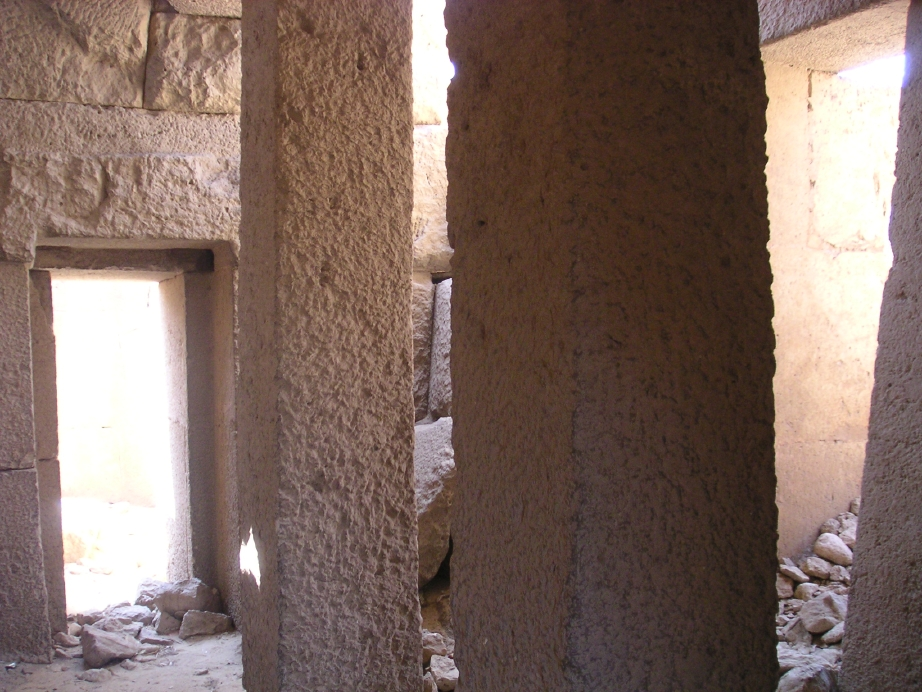 Salle intérieure du mastaba de Sechemnéfer III à Gizeh - Ve dynastie égyptienne